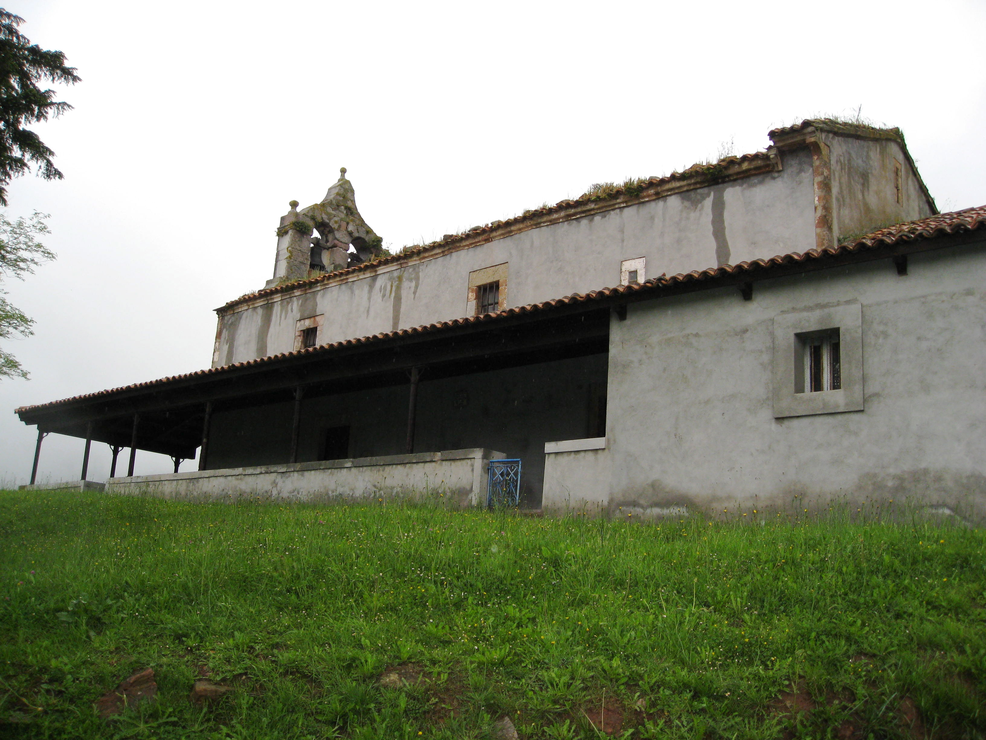 Iglesia de Santiago de Arlós, concejo de Llanera, Asturias